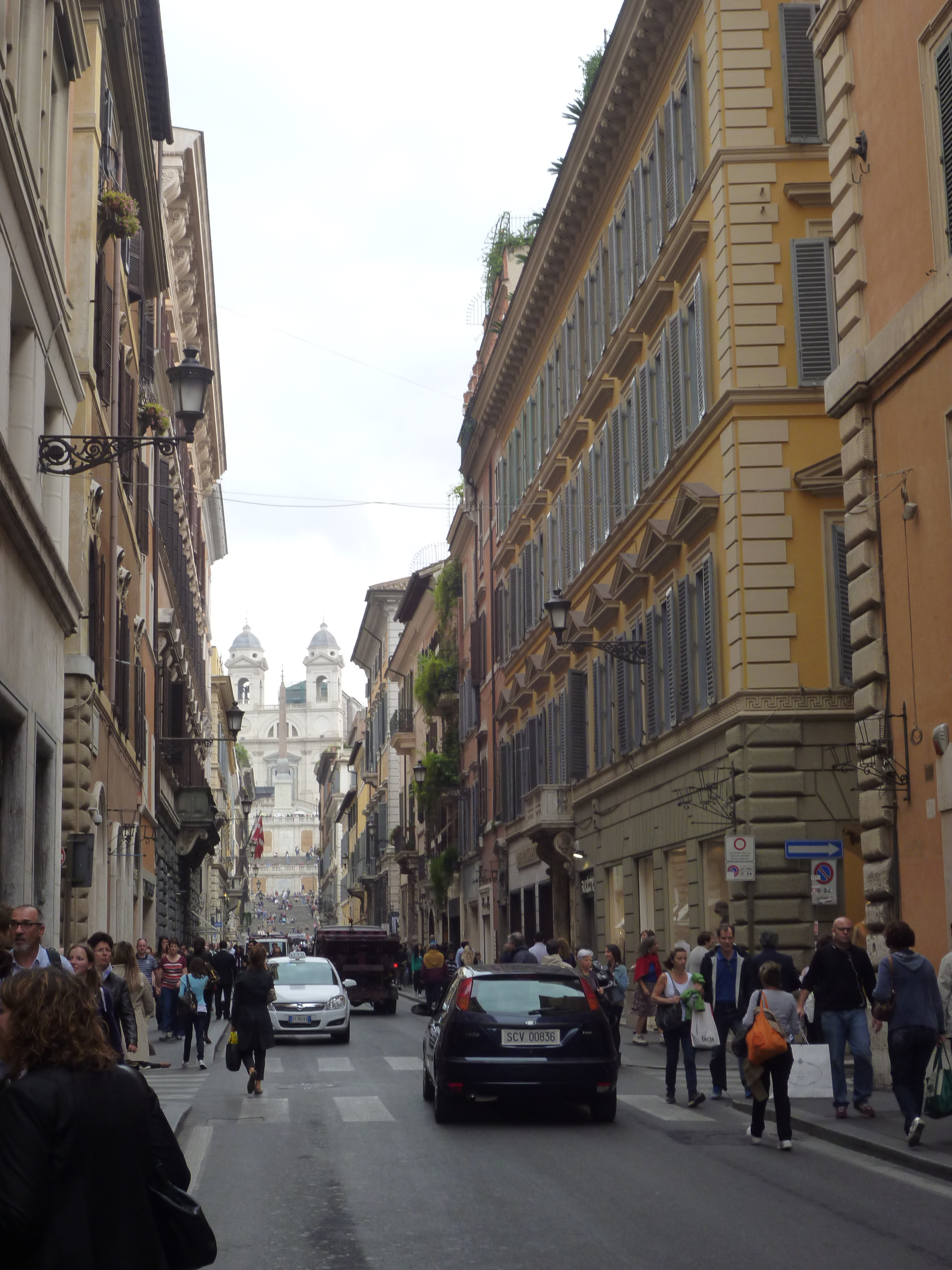 Rome, summer 2012